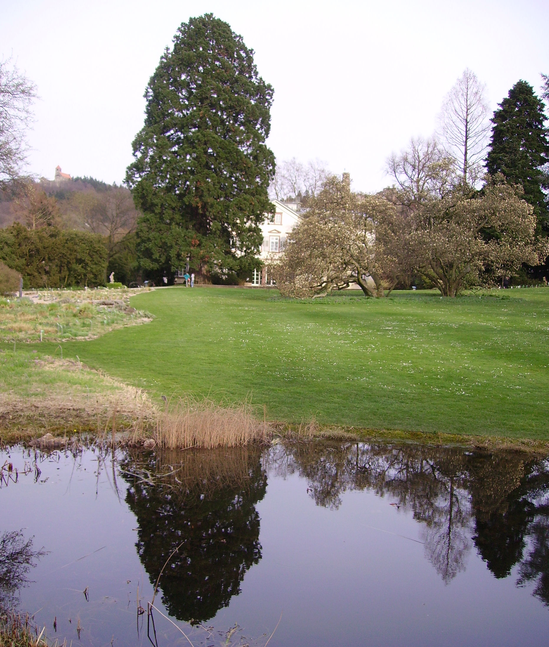 garden in Weinheim, Germany